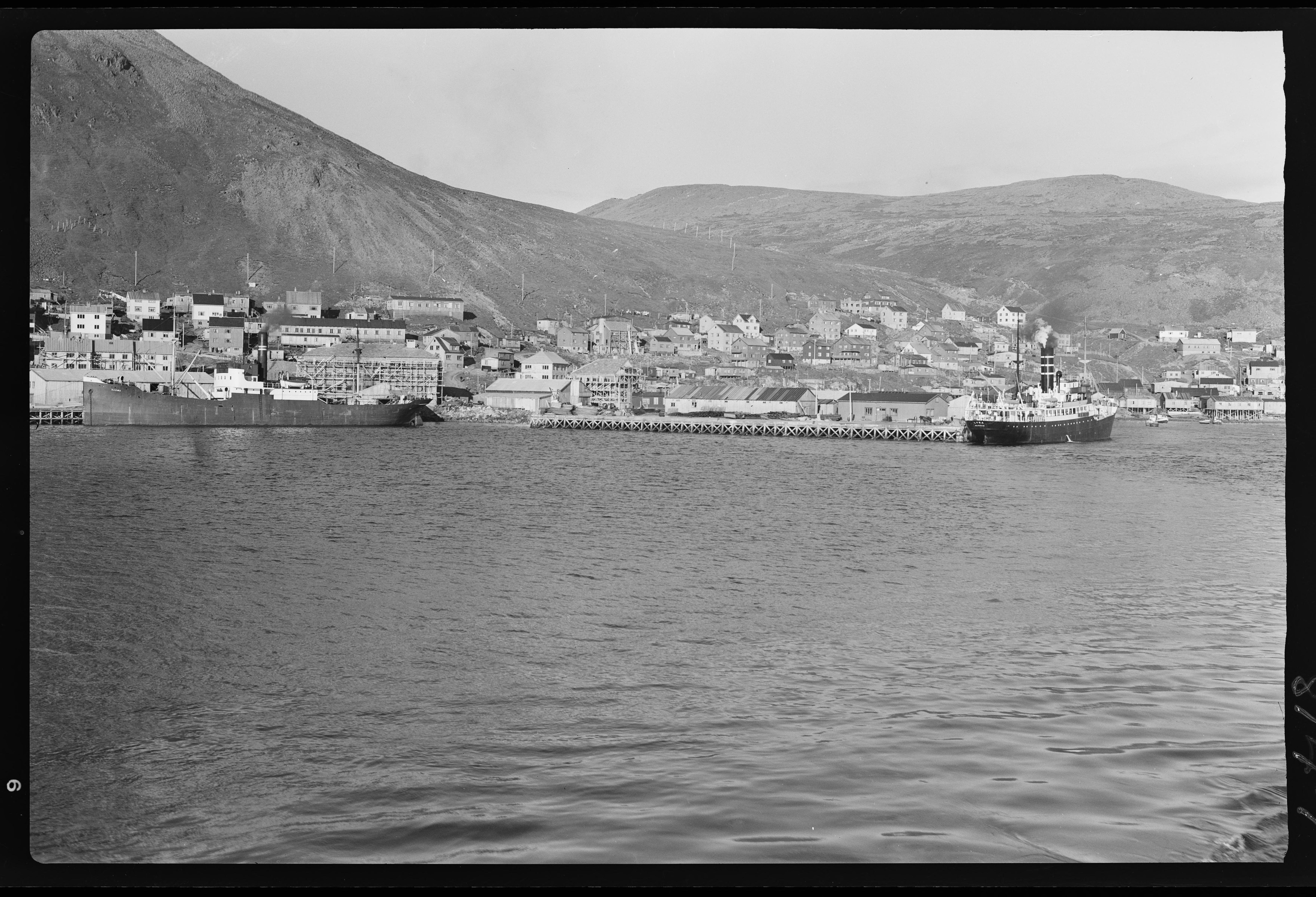 Bildet er hentet fra Nasjonalbibliotekets bildesamling. Anmerkninger til bildet var: Fotograf : ukjent Honningsvåg, Nordkapp, Finnmark